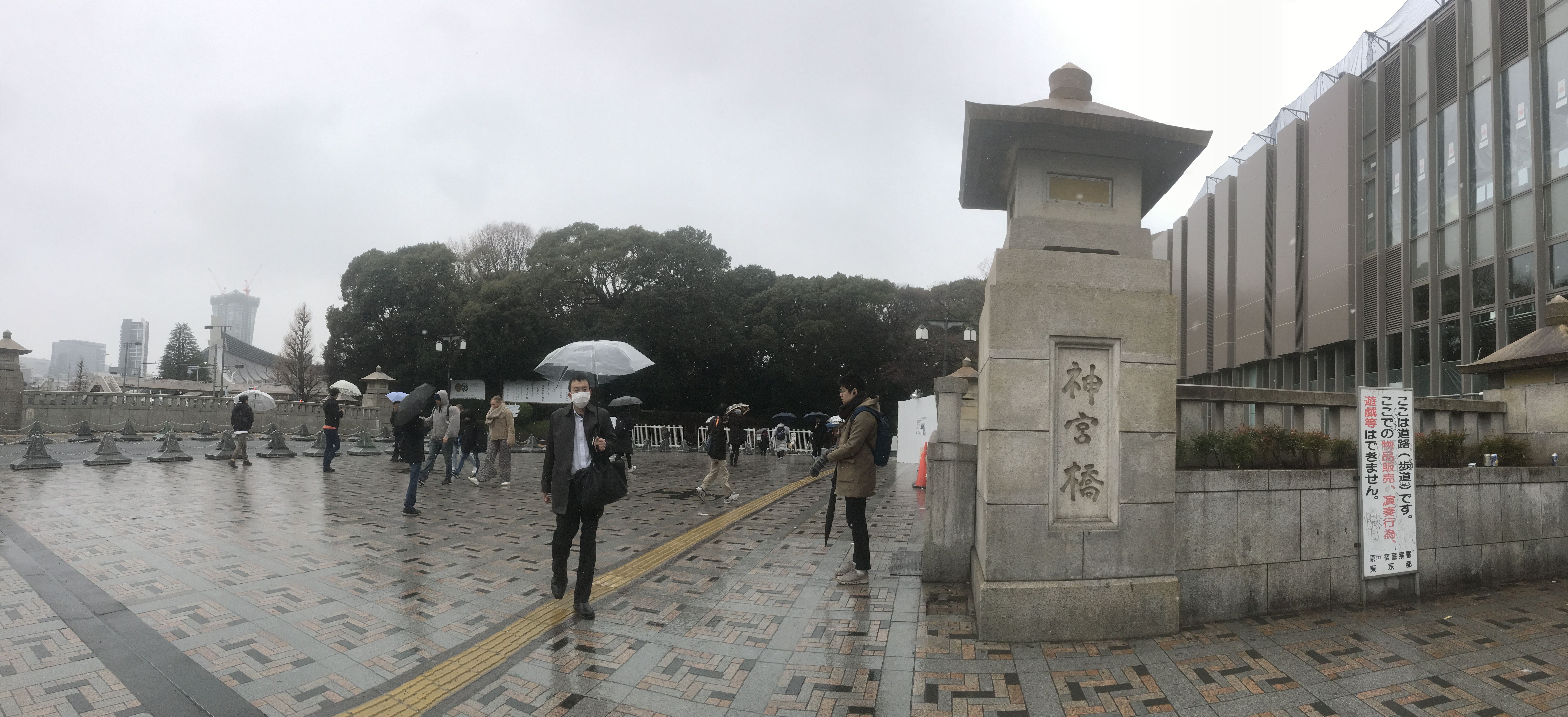 神宮橋 (Jingubashi)